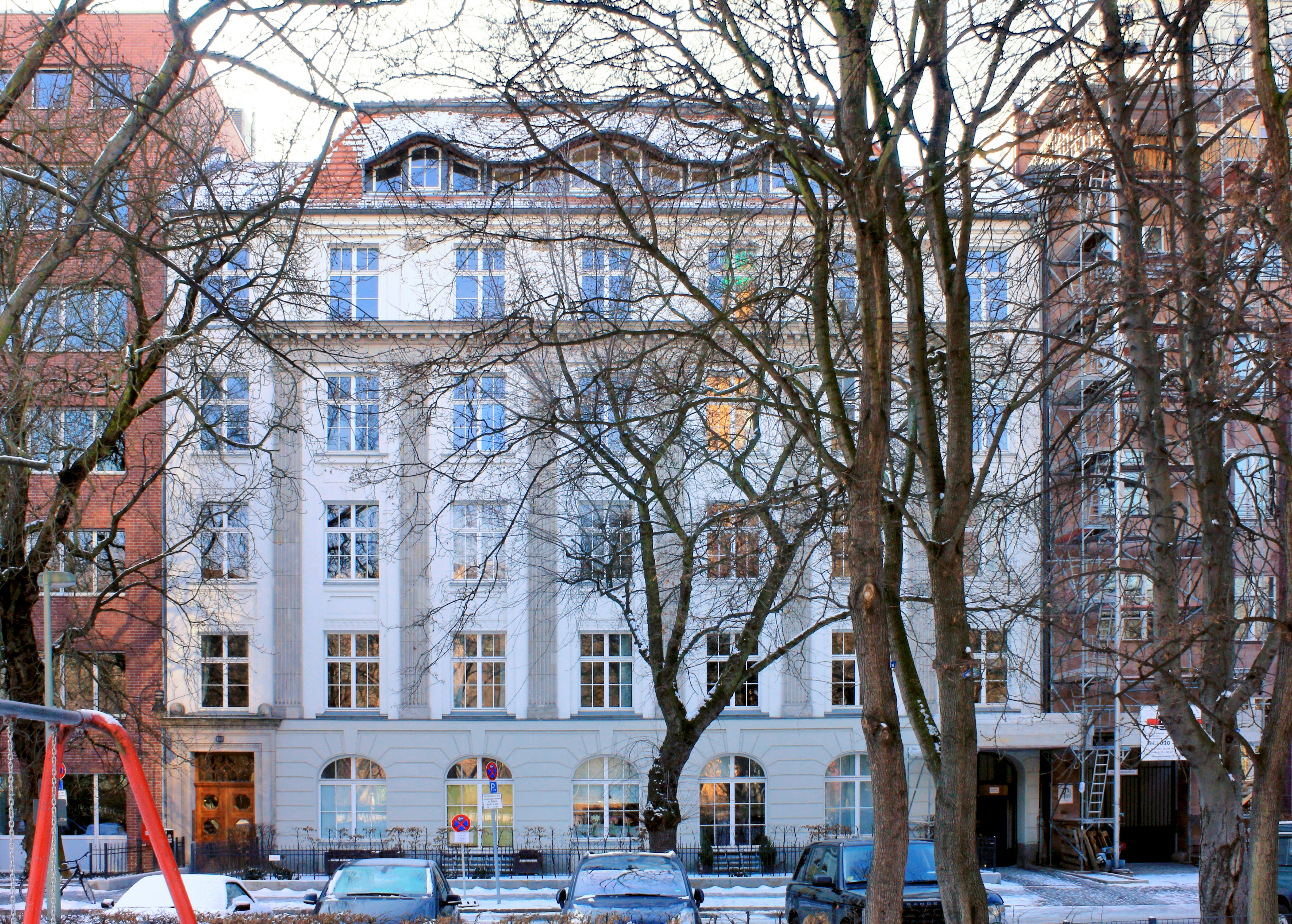 1910-11 von Franz Hildebrandt